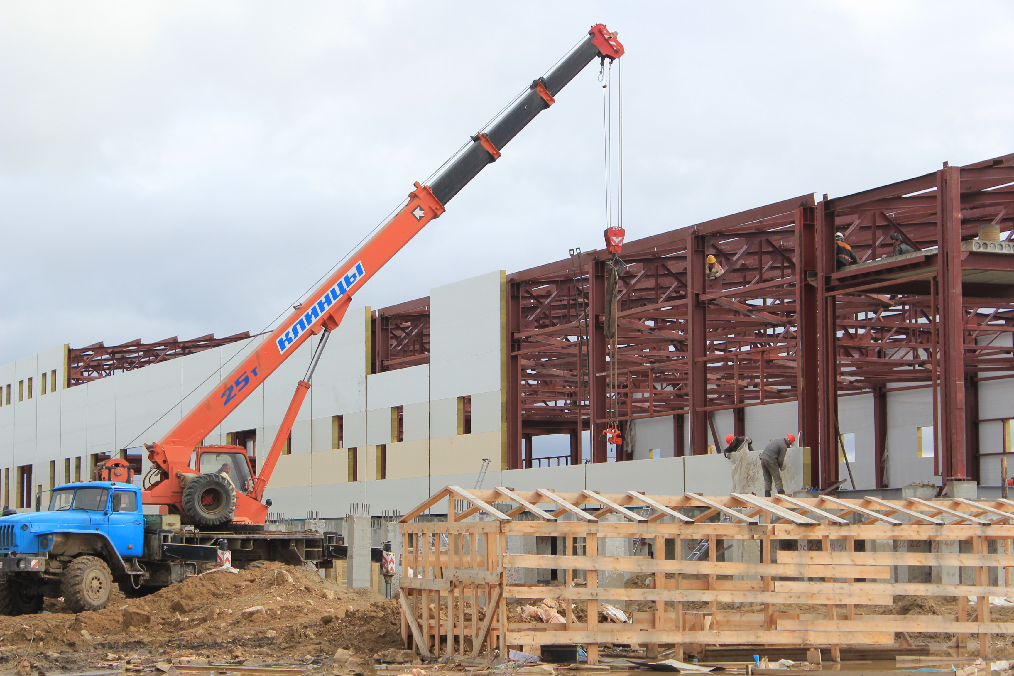 Автокран на строительстве конeчной станции Амуро-Якутской магистрали "Нижний Бестях" (напротив Якутска)